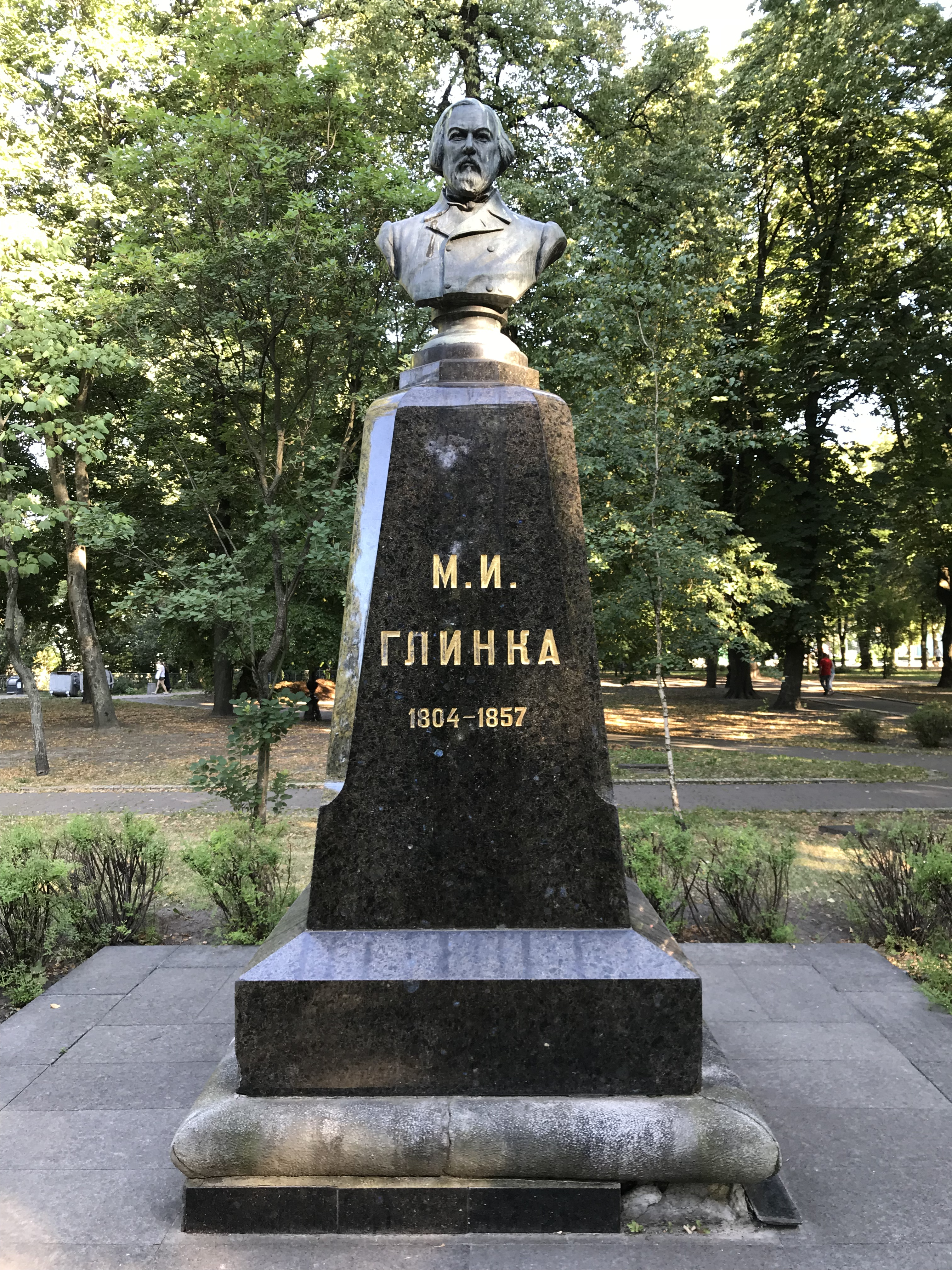 Памятник Михаилу Глинке в Киеве